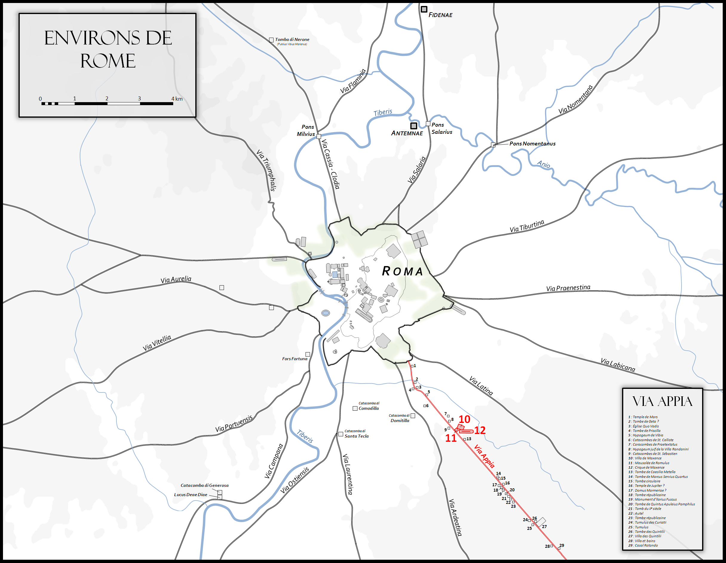 Localisation de la Villa de Maxence